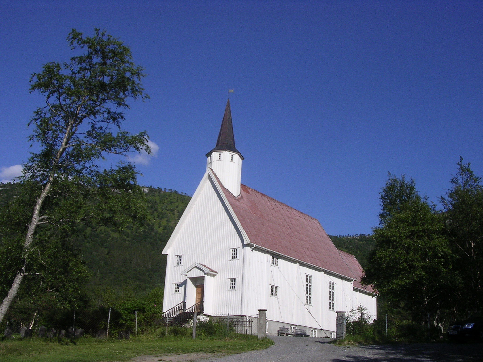 Aldersundet kirke, Lurøy, Nordland